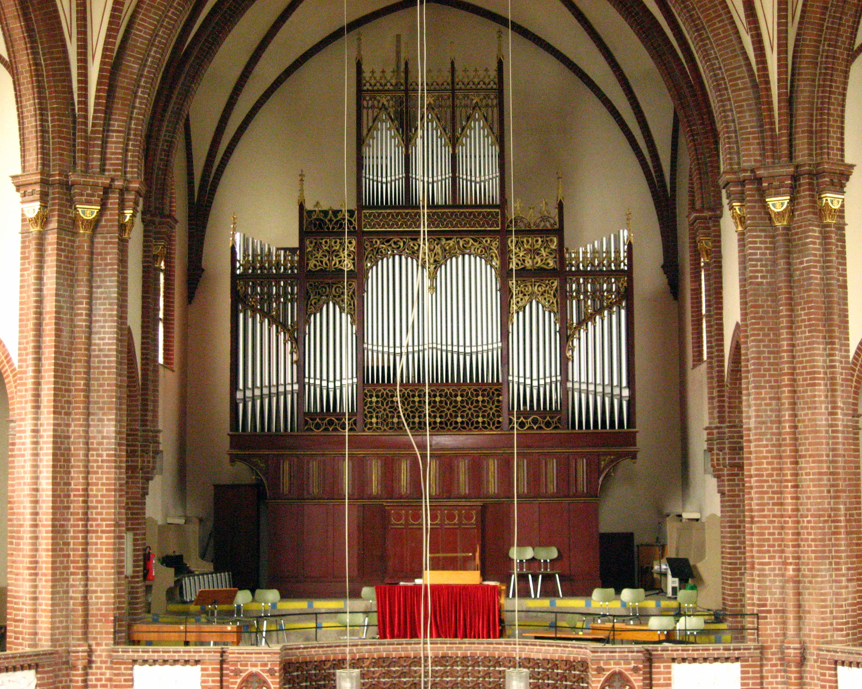 Orgel der Heilig-Geist-Kirche Berlin-Moabit, 1906 erbaut von E.F. Walcker & Cie.